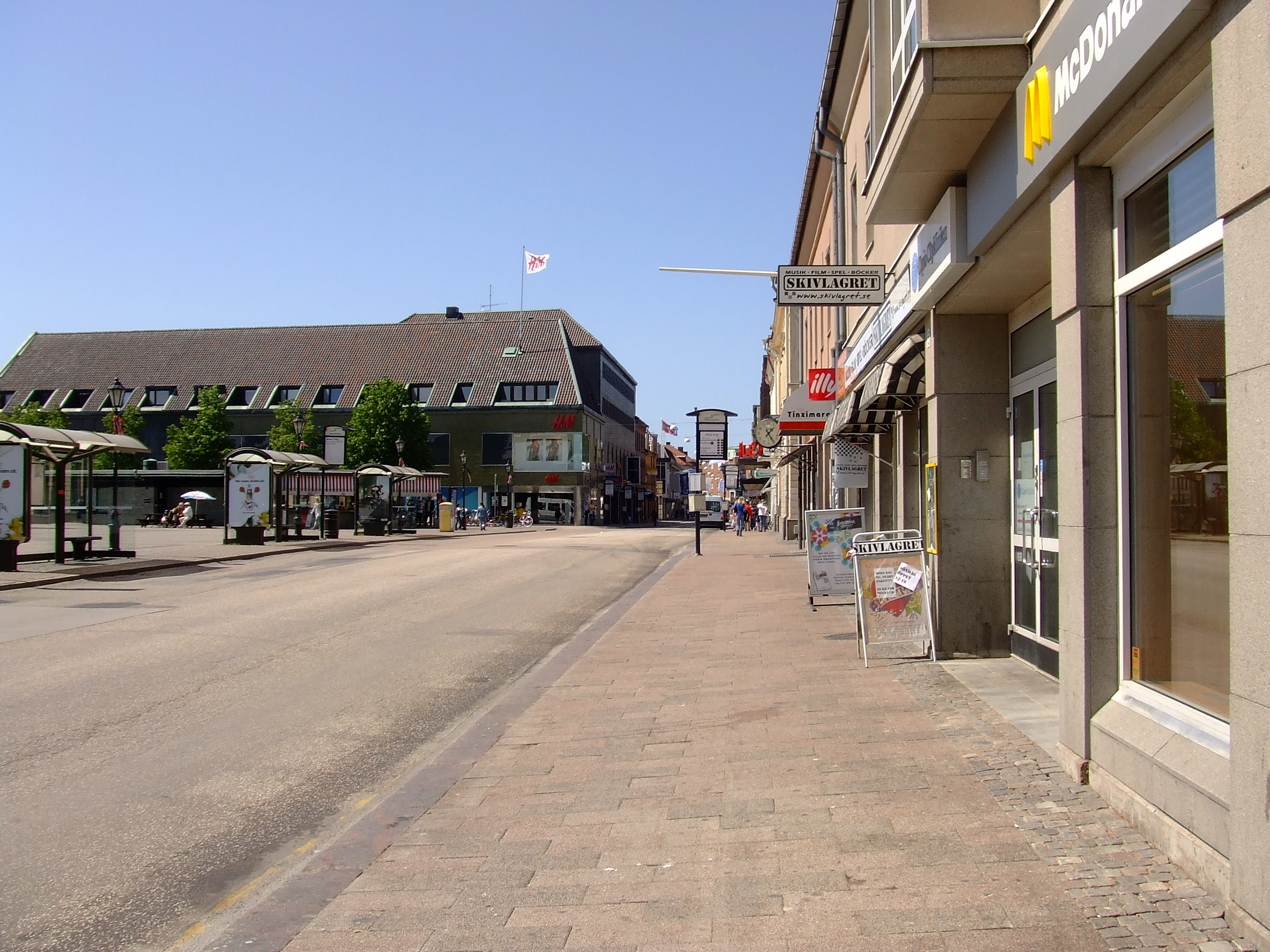 Brogatan (Bridgestreet) in Halmstad.